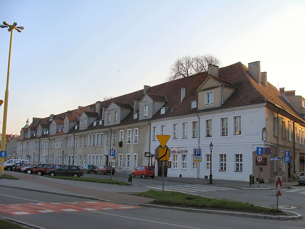 Szczecin - Domki Profesorskie przy ul. Korsarzy